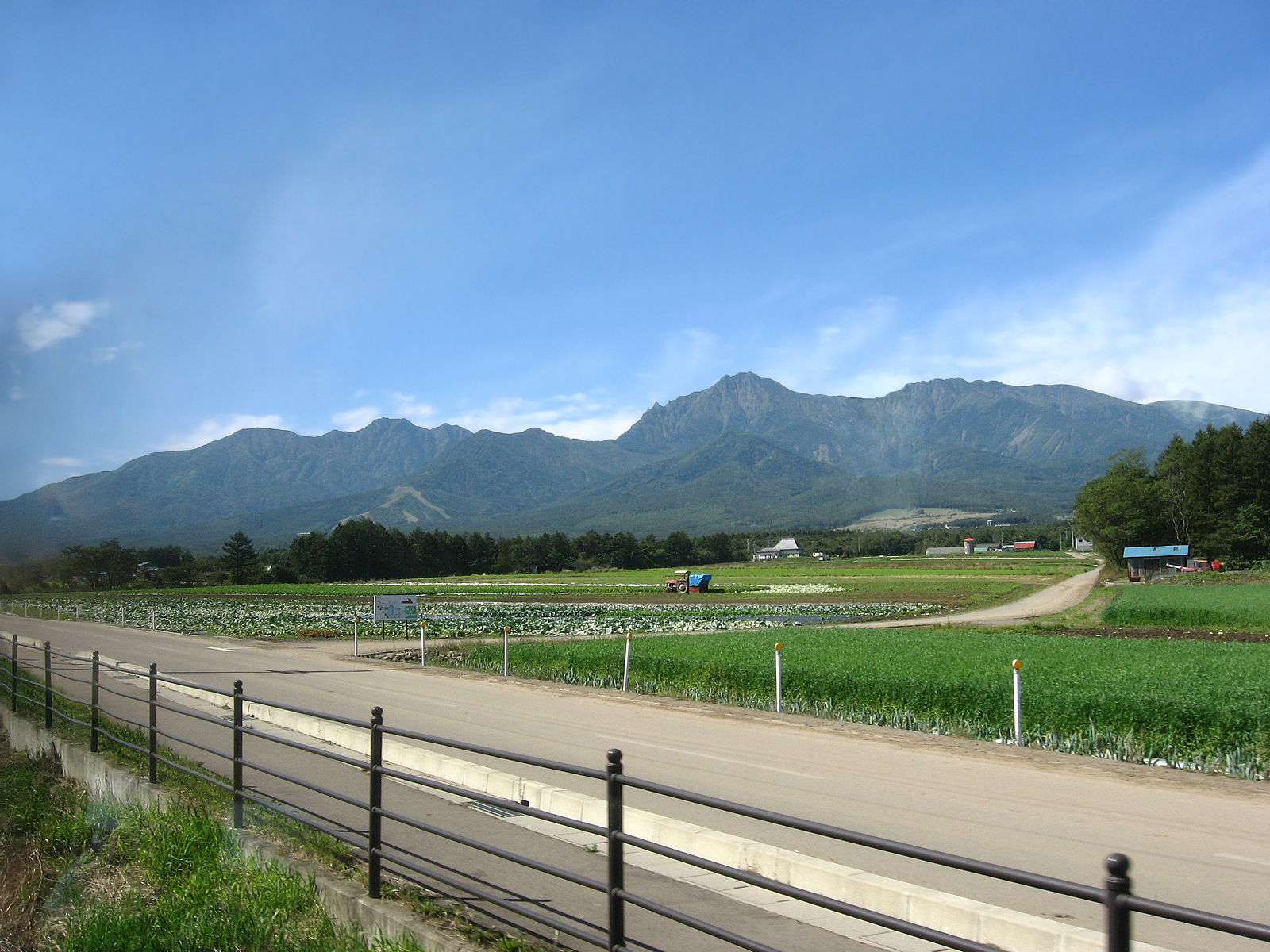 東方の小海線から見た八ヶ岳。中央の高峰が赤岳。